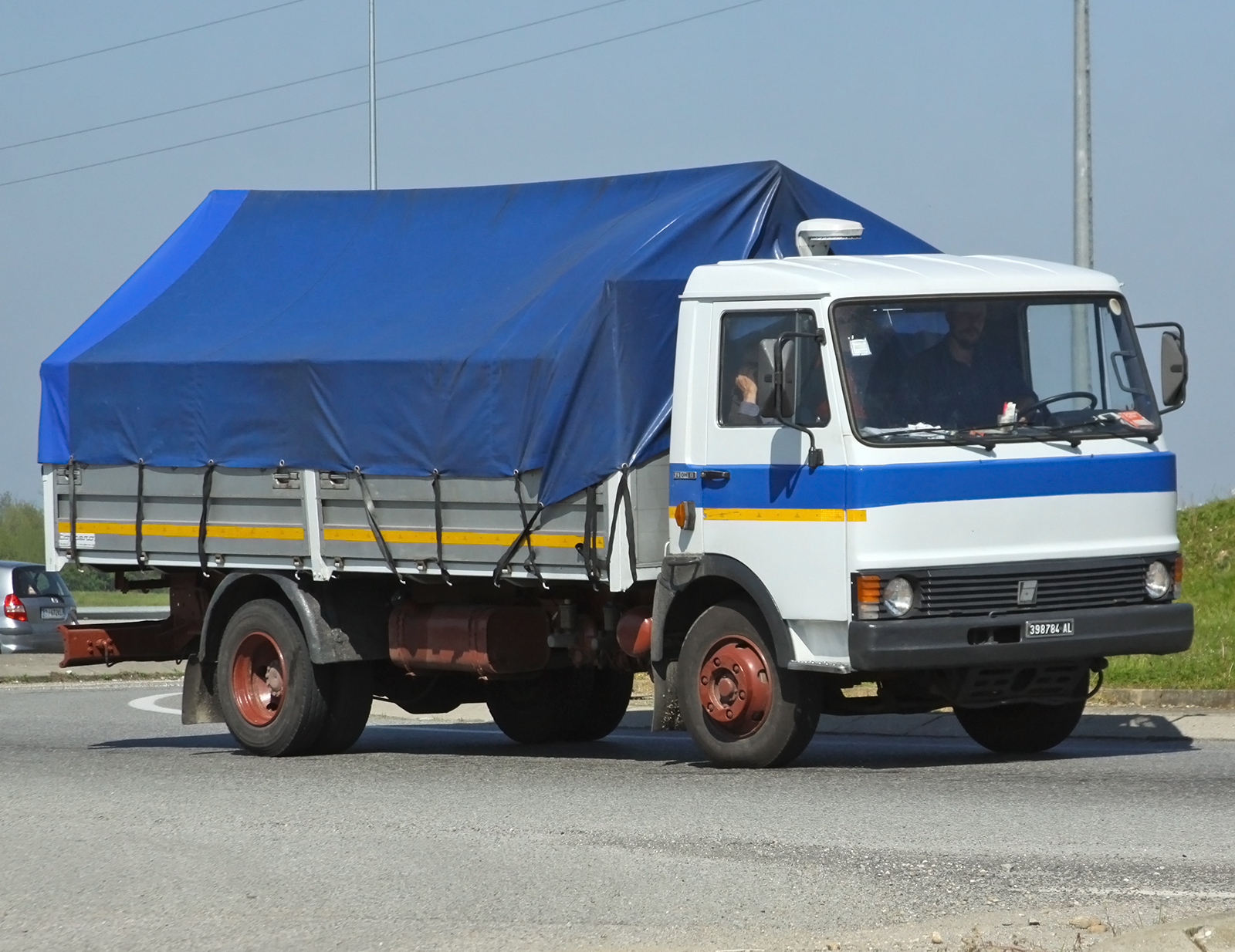 Iveco OM 79.13